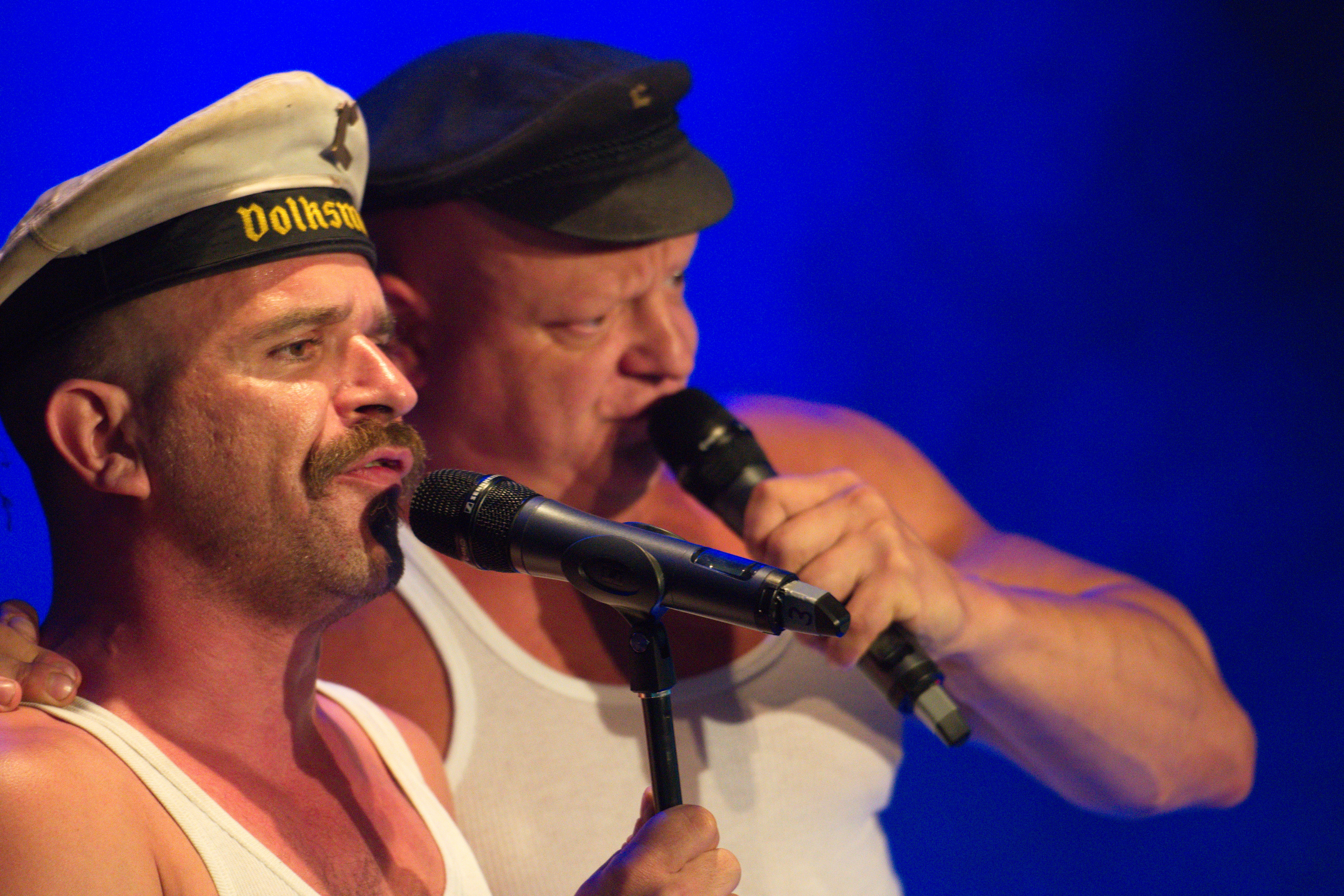 Rummelsnuff (Roger Baptist), Amphi festival 2017